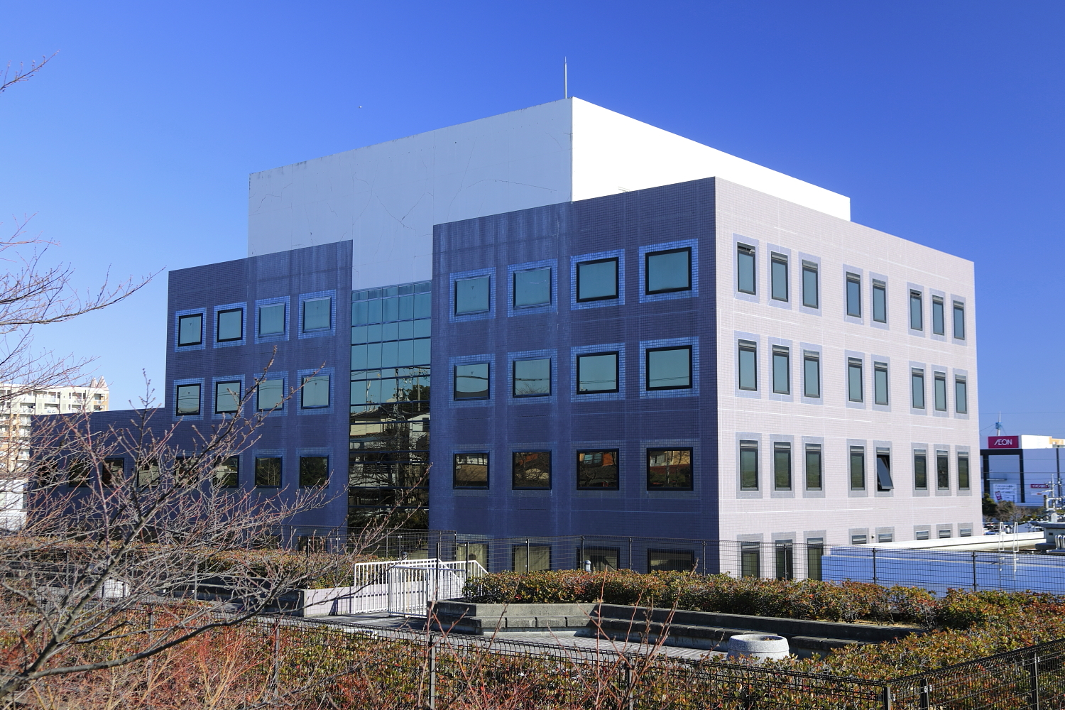 豊田合同庁舎外観（豊田市常盤町、2019年（平成31年）1月）